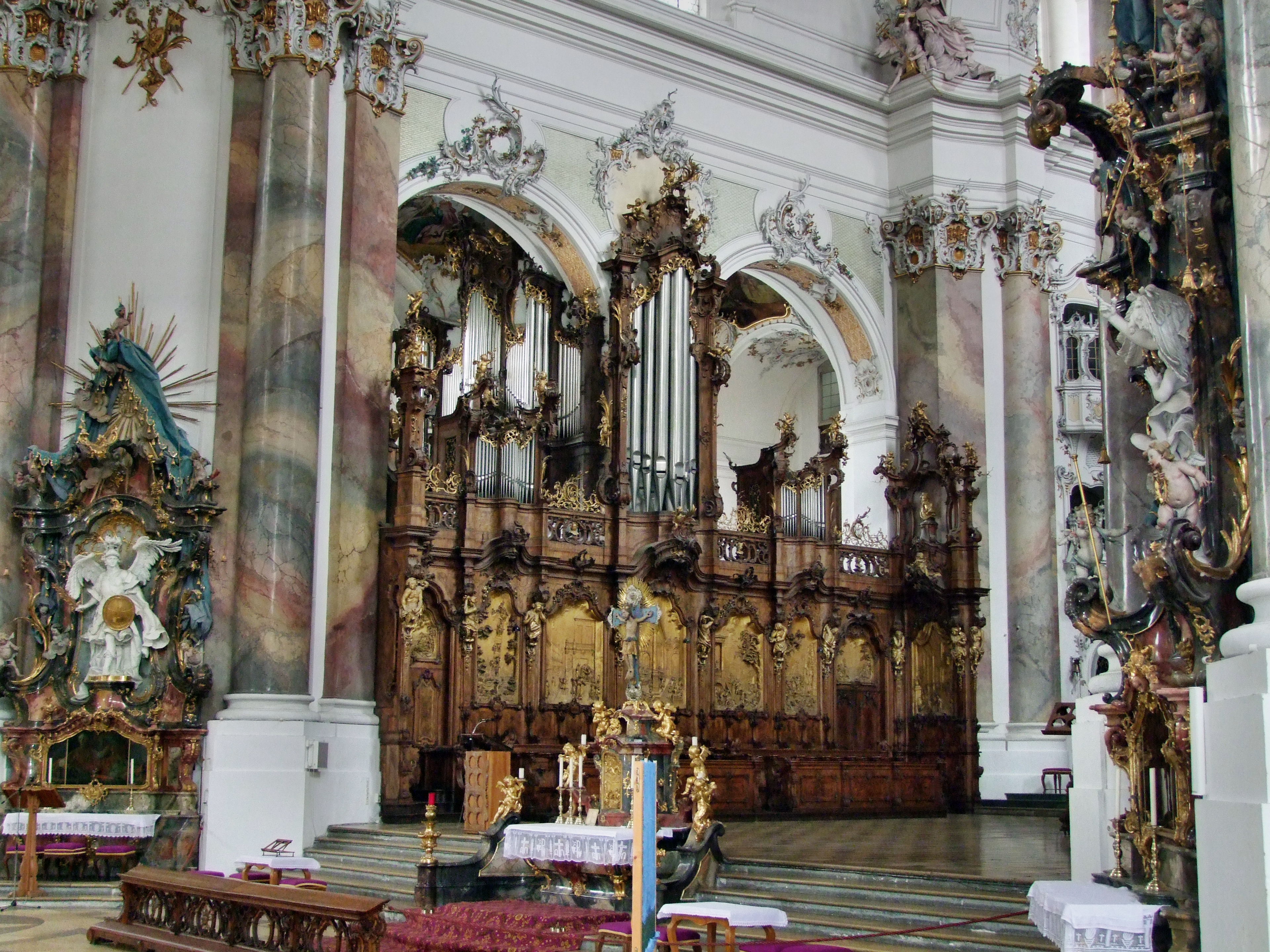 Blick auf die Heilig-Geist-Orgel (F10), Basilika Ottobeuren